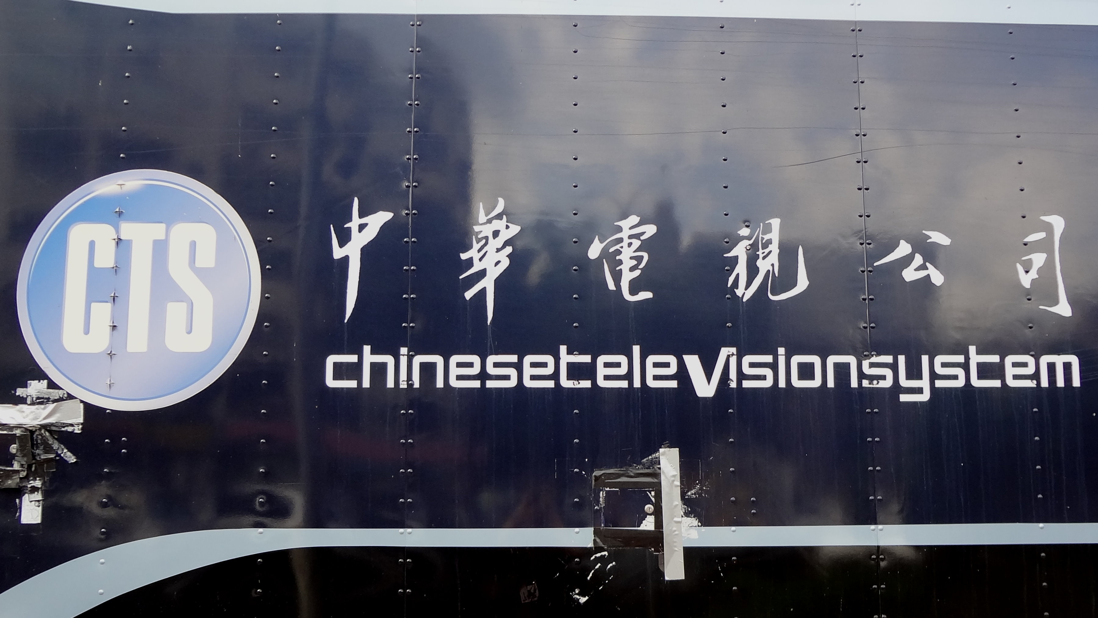 中華電視公司數位轉播車BA-125車身左側，中華電視公司銀色英文商標及白色中英雙語標準字。